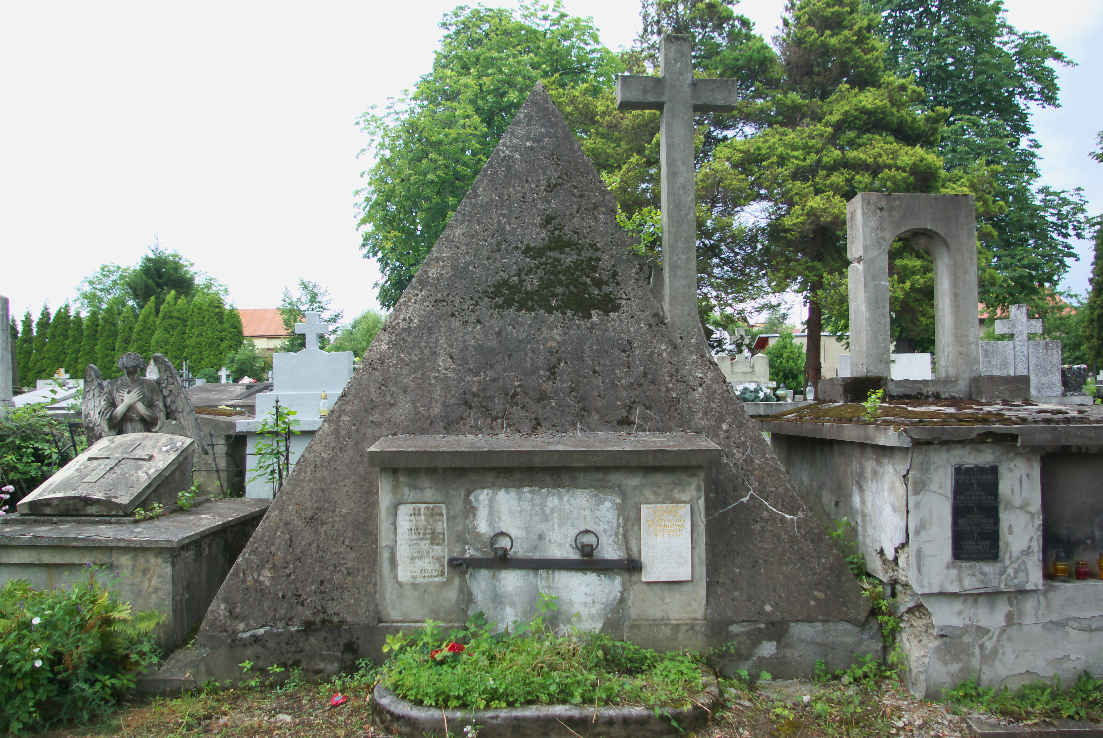 Grobowiec rodziny Szomek i Pajączkowski na Cmentarzu Centralnym w Sanoku.